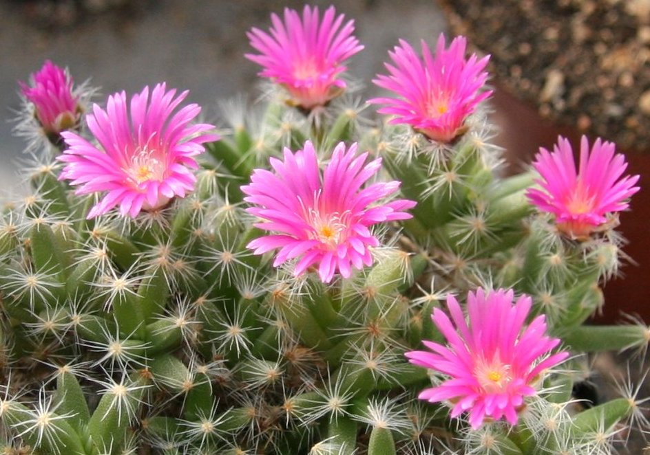 Trichodiadema densum in Blüte